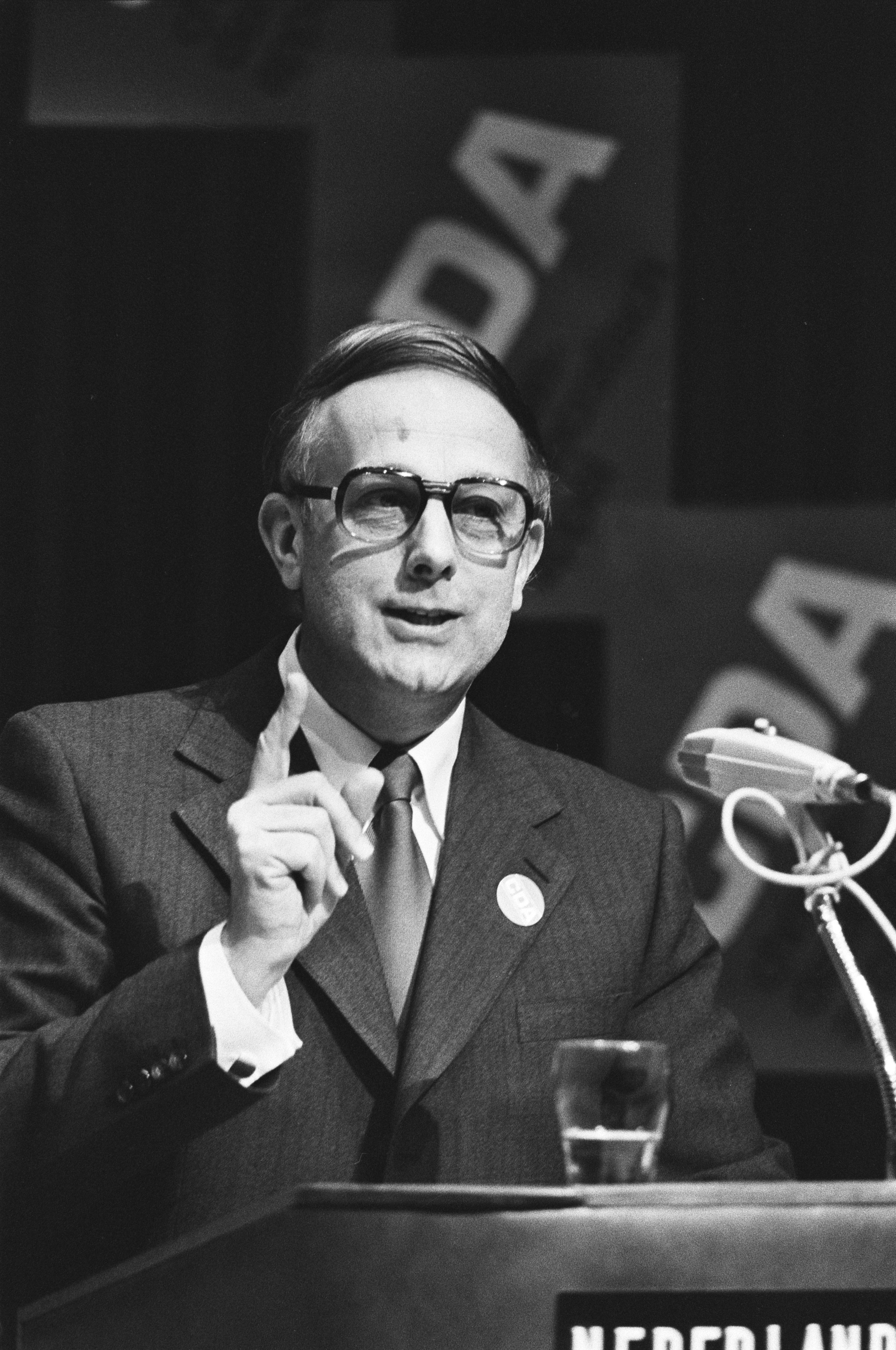 Collectie / Archief : Fotocollectie Anefo Reportage / Serie : [ onbekend ] Beschrijving : CDA-congres in Den Haag (1e dag); Piet Steenkamp (voorzitter CDA) spreekt, kop Datum : 10 december 1976 Locatie : Den Haag, Zuid-Holland Trefwoorden : congressen, voorzitters Persoonsnaam : Steenkamp, Piet Fotograaf : Verhoeff, Bert / Anefo Auteursrechthebbende : Nationaal Archief Materiaalsoort : Negatief (zwart/wit) Nummer archiefinventaris : bekijk toegang 2.24.01.05 Bestanddeelnummer : 928-9302